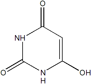 Struktur:Tor Svensson